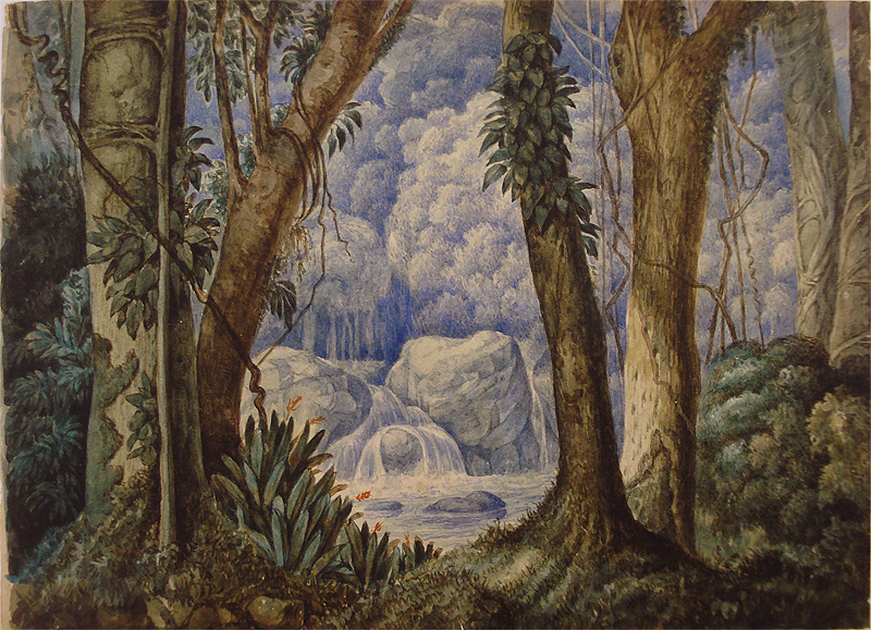 Manuel de Araújo Porto-alegre, Selva brasileira, aquarela sobre papel, sem data, acervo do Museu Júlio de Castilhos